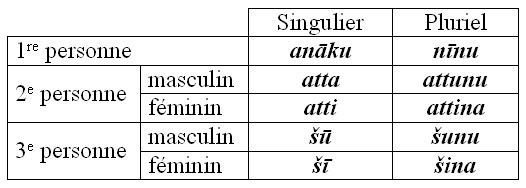 Tableau réalisé avec Microsoft Word. Déclinaison du pronom indépendant en akkadien.